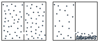 Fenomena Iblis Maxwell